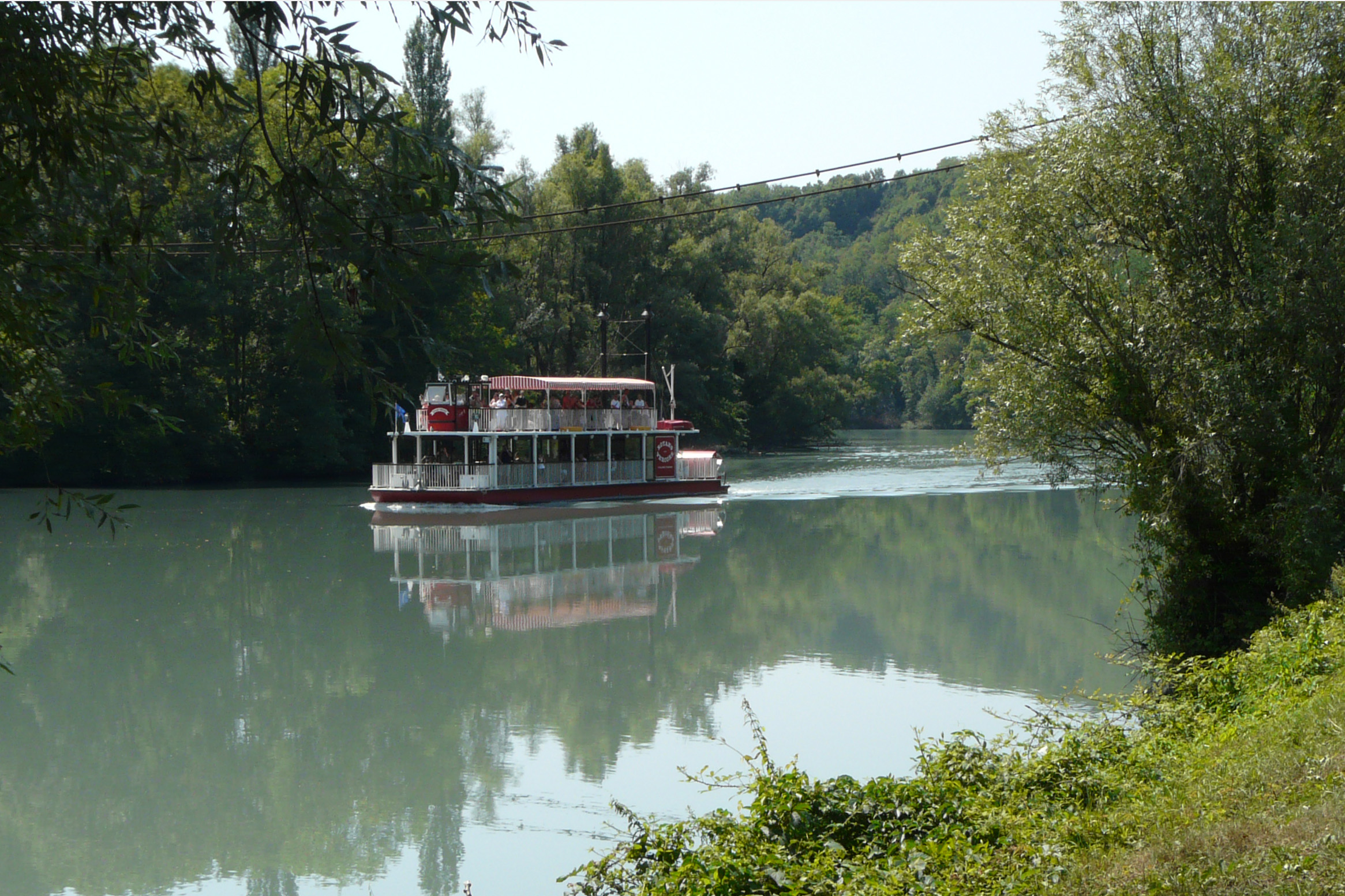 l'isère vu depuis les rives à La Sône, avec son bateau à roue (contrairement aux apparences, ce n'est pas un Bateau à roues à aubes à vapeur, c'est juste décoratif)